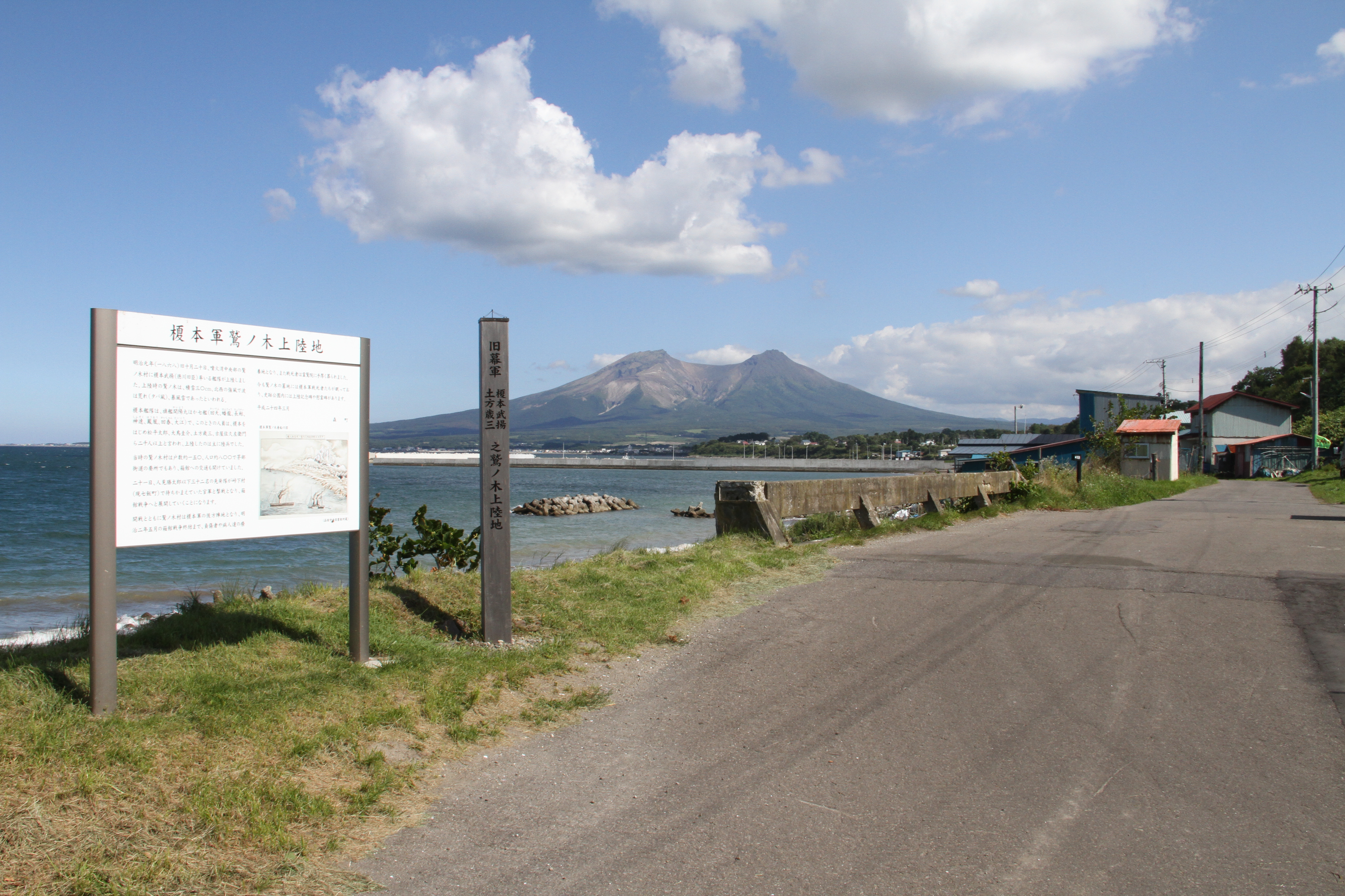 北海道森町榎本武揚上陸地